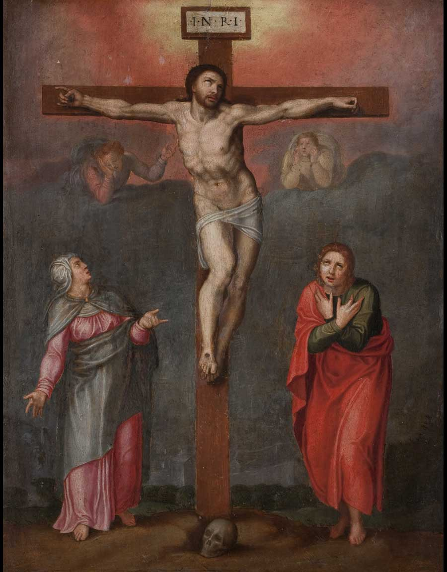 derivato dal disegno del 1540 eseguito da Michelangelo Buonarroti per Vittoria Colonna.